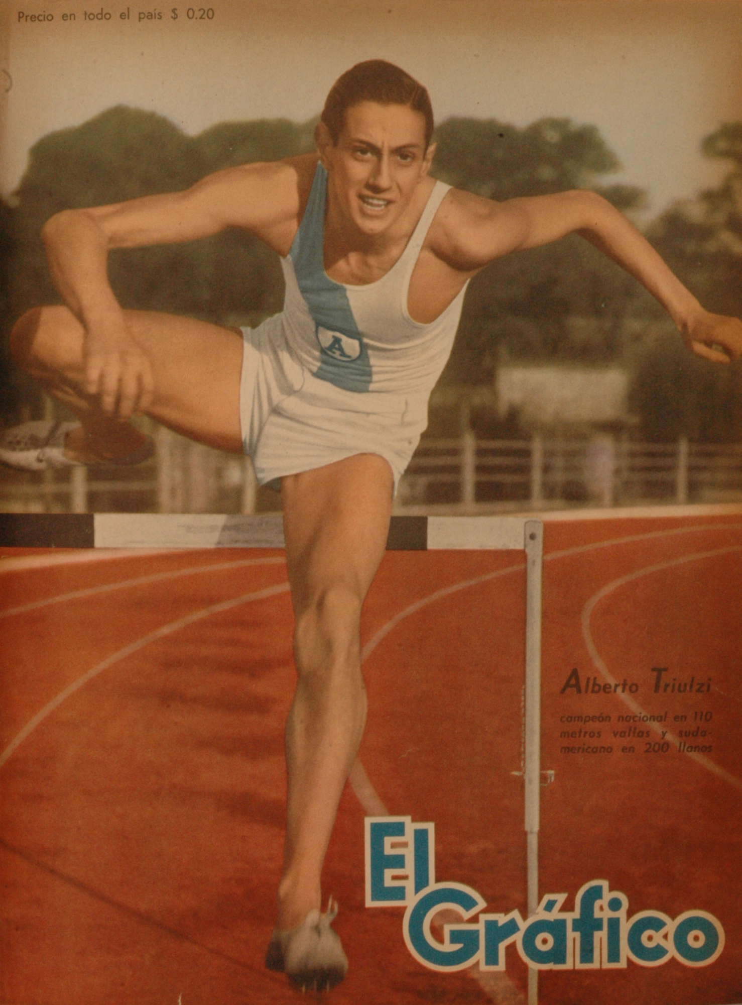 El Grafico del 06 de Septiembre de 1946. Edicion 1417